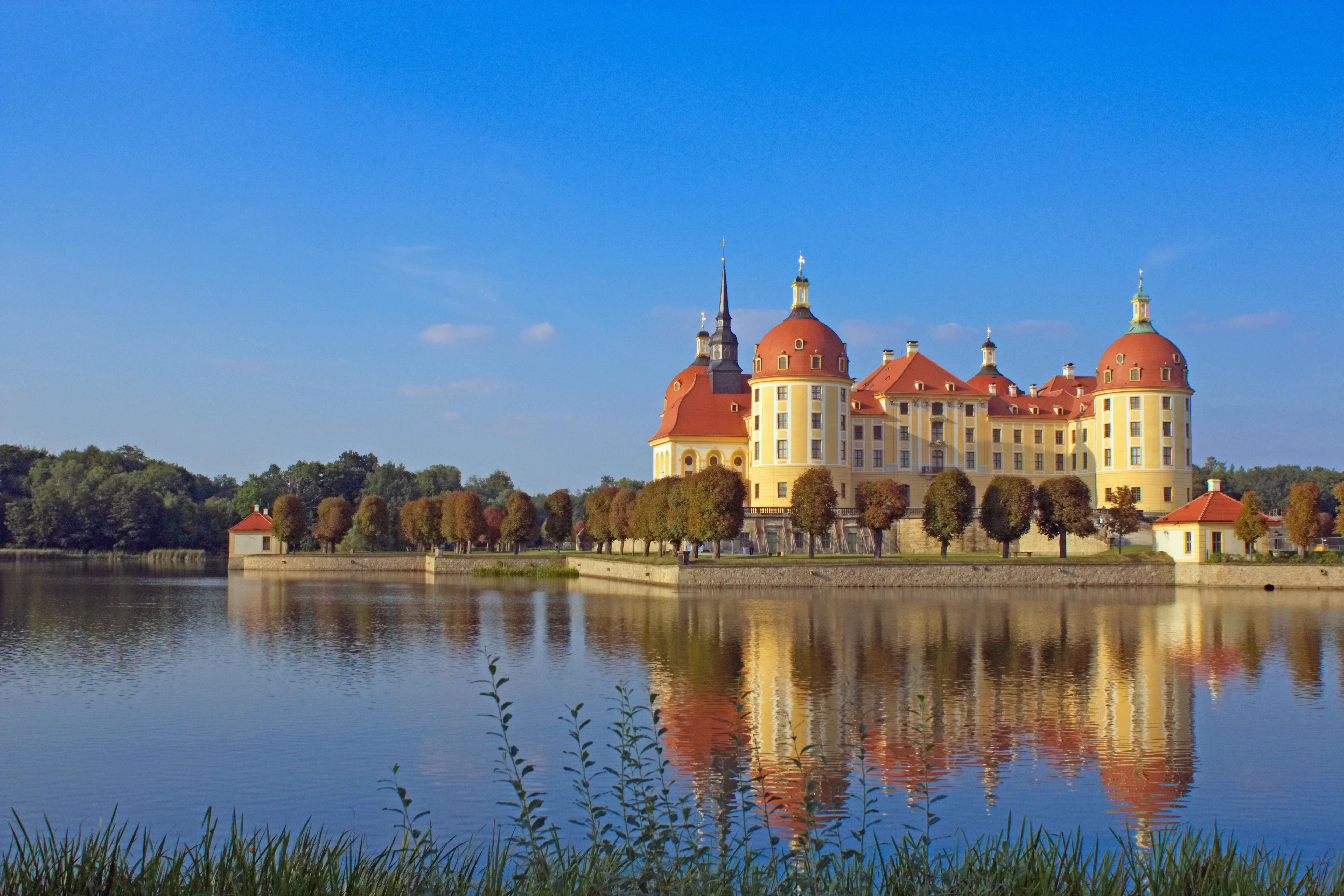 Das Schloss Moritzburg von Süd-West aufgenommen.